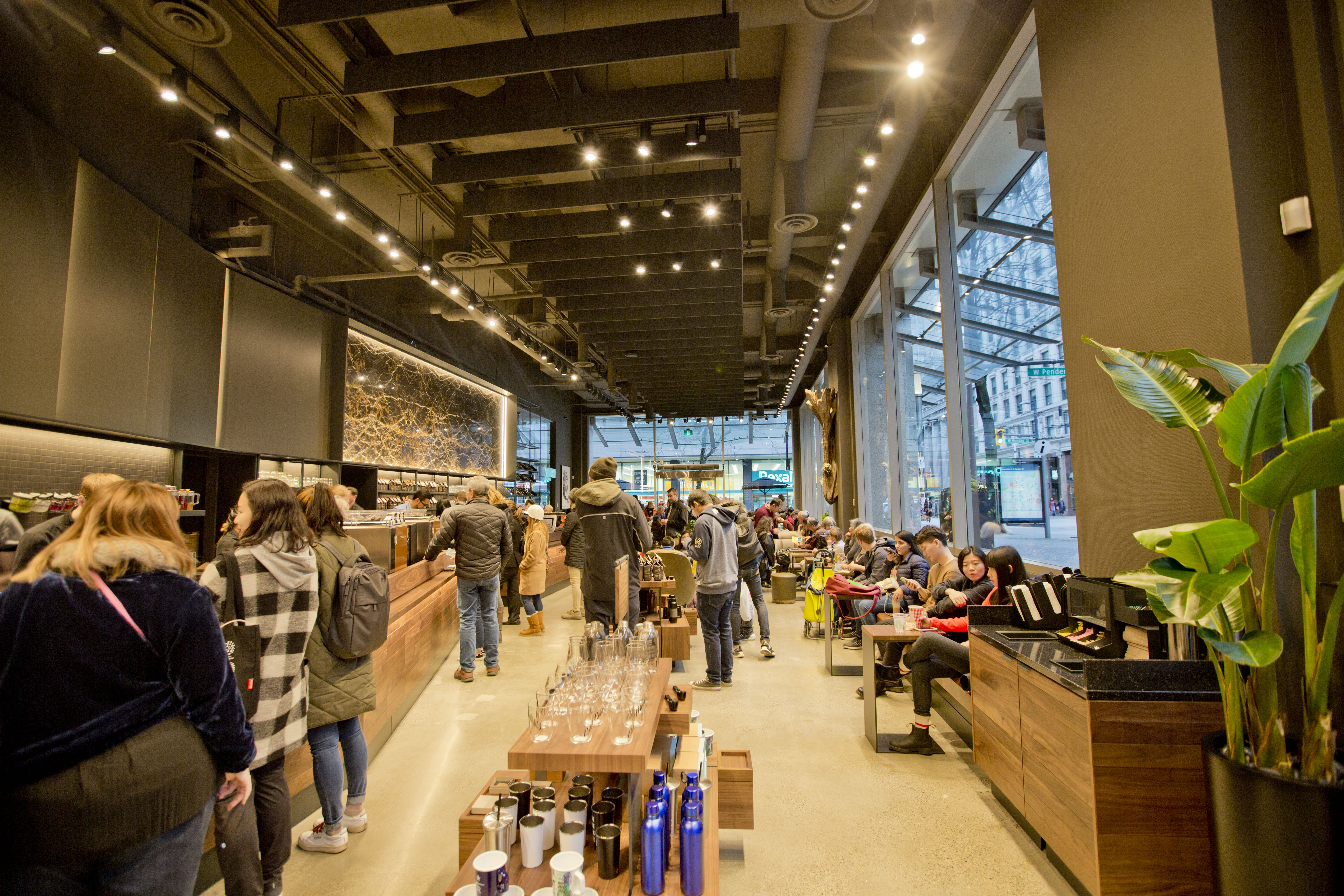 Starbucks Reserve Bar @ Pender x Granville street